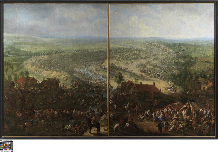 Het graven van de Gentse vaart (Jan Anton Garemijn, 1753); collection: Musea Brugge - Groeningemuseum